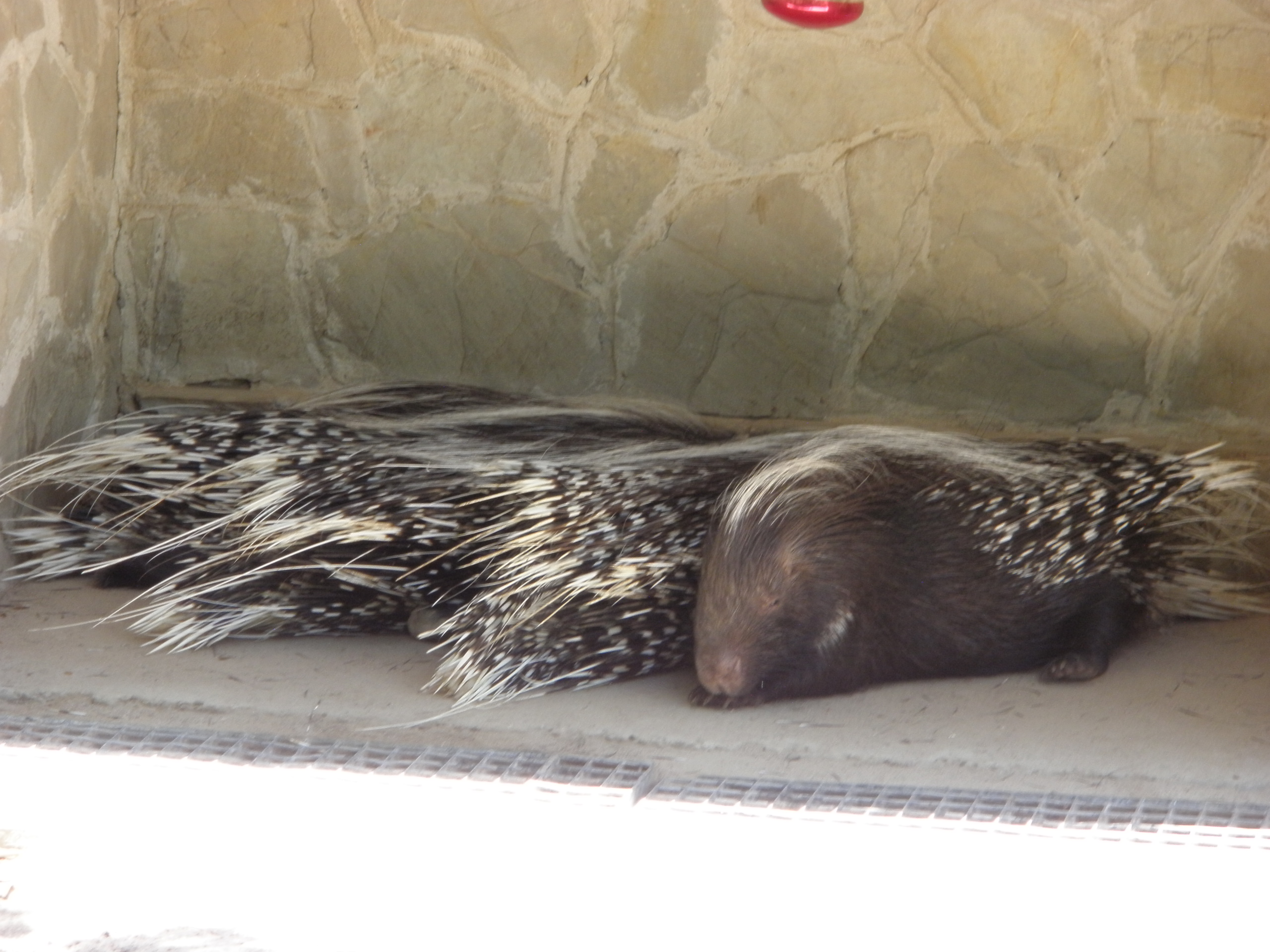 Puercoespín sudafricano, Zoobotánico Jerez.